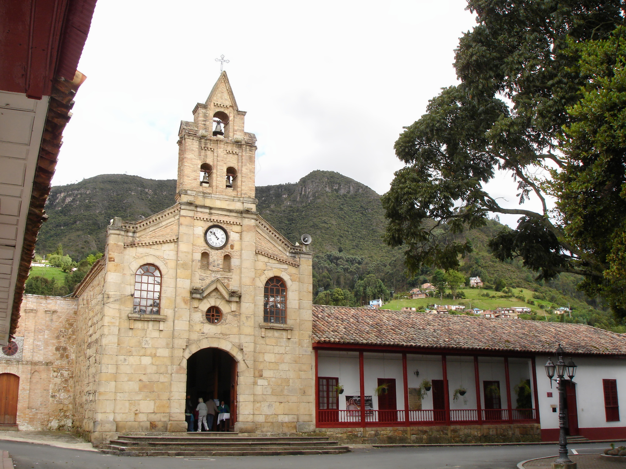 Iglesia y Casa Cural del Divino Salvador